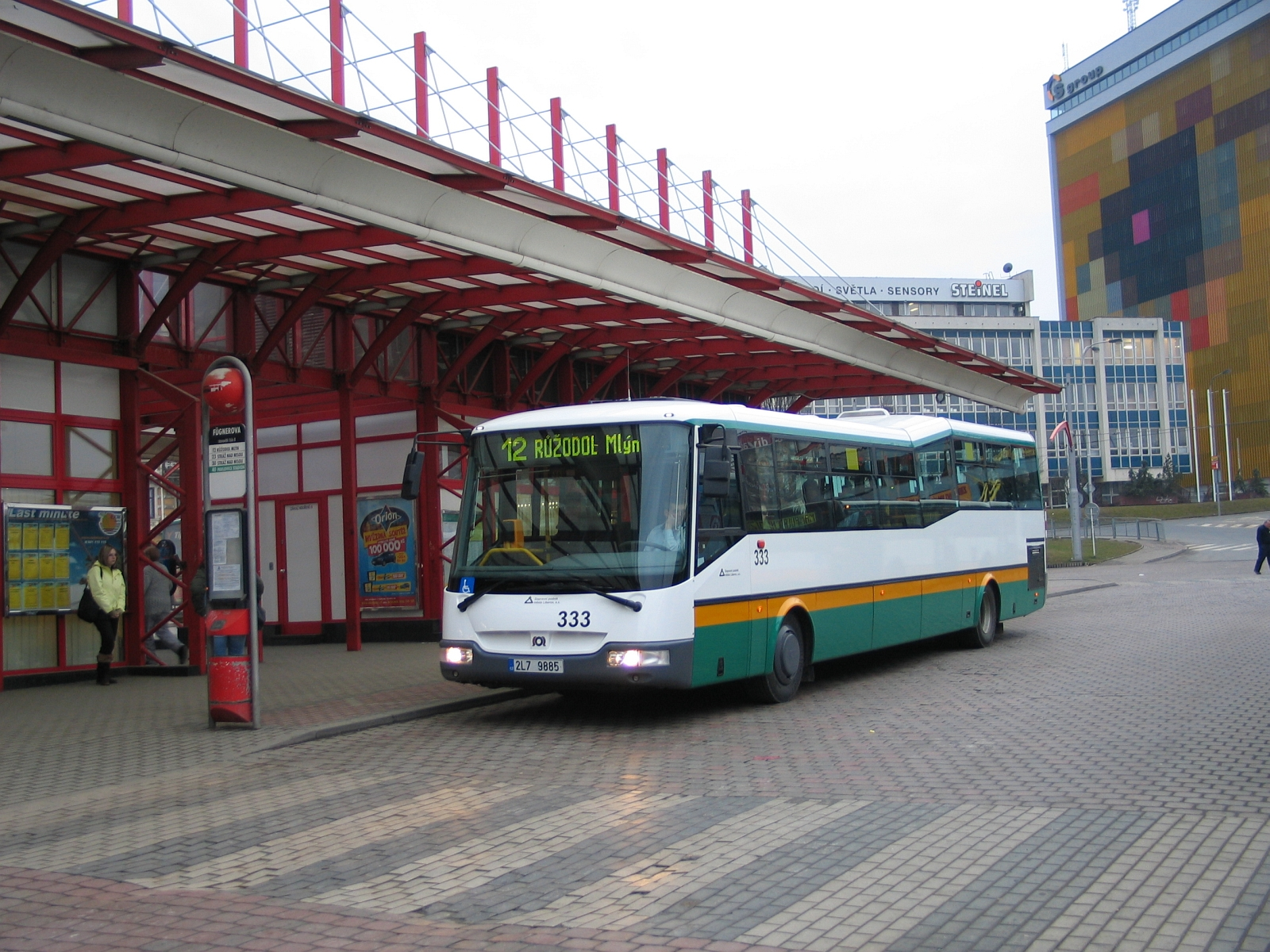 SOR BN 12, Liberec